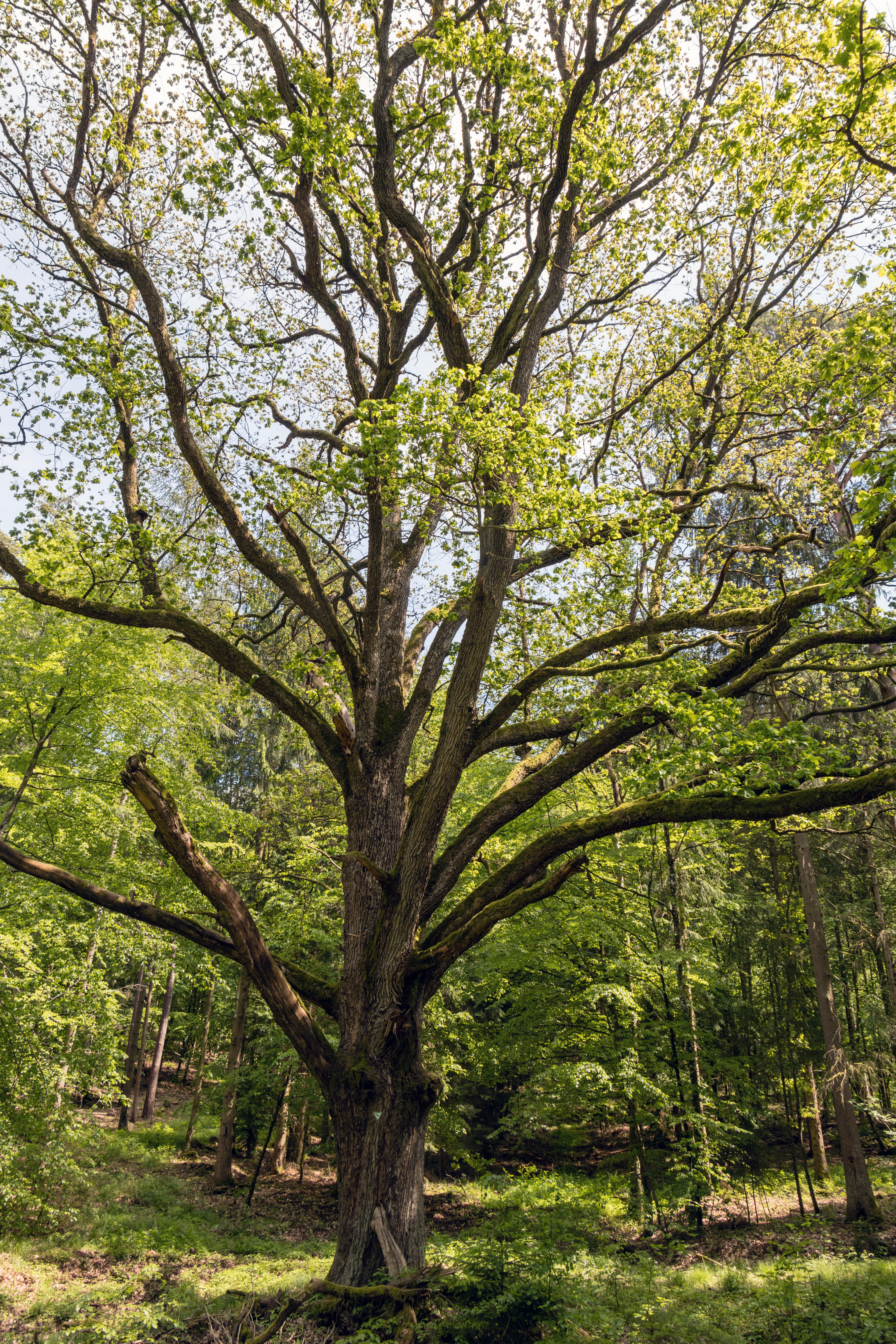 Engelthaler Alteiche, Engelthal, Naturdenkmal